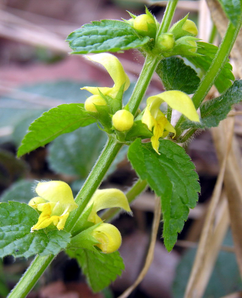 Geltonžiedis šalmutis (Lamiastrum galeobdolon) Šeima. Notreliniai (Lamiaceae) Fotografavo: Algirdas, 2006 m. gegužės 13 d., Lietuva